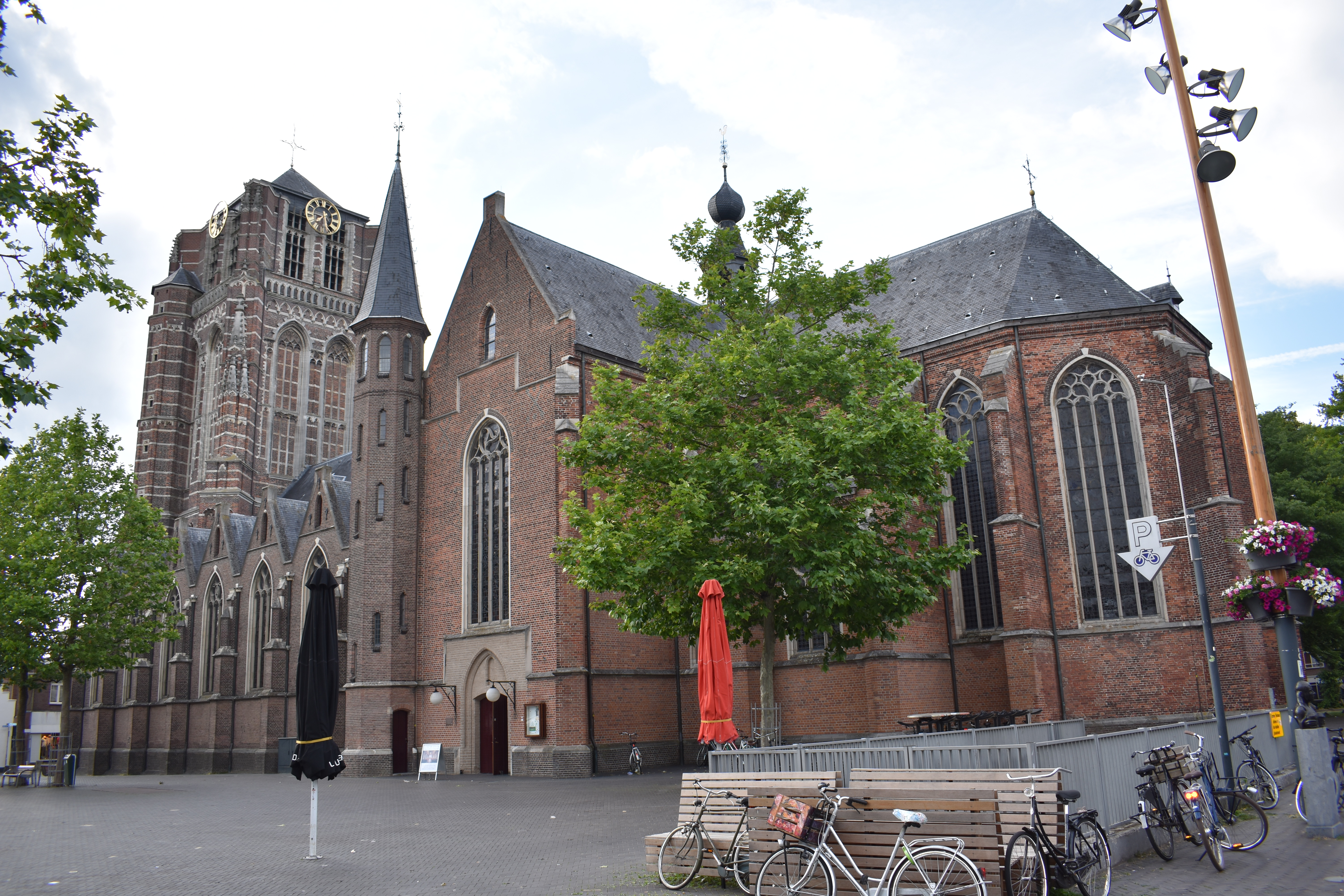 Zicht op de Basiliek St. Jan, Markt 17, 4901 EP, Oosterhout Wikidata has entry Q1824314 with data related to this item.